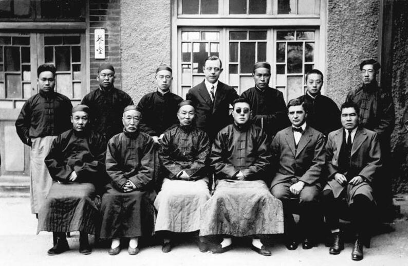 China, Tsingtau Lehrerkollegium mit dem Leiter Pfarrer Dr. Seufert der Höheren Knabenschule der Ostasien-Mission in Tsingtau.